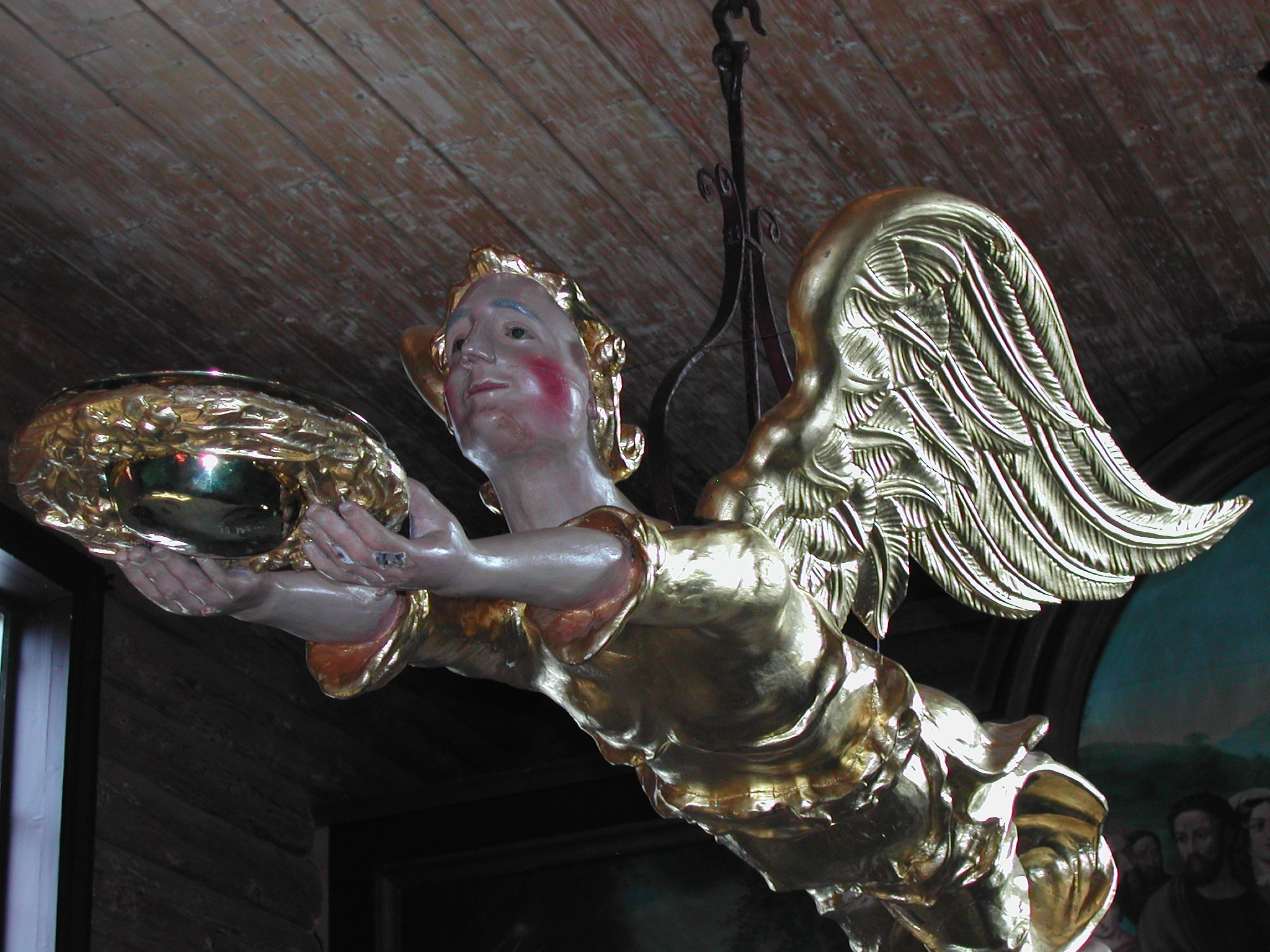 Ved barndåp vert denne dåpsengelen frå 1782 firt ned i koret.